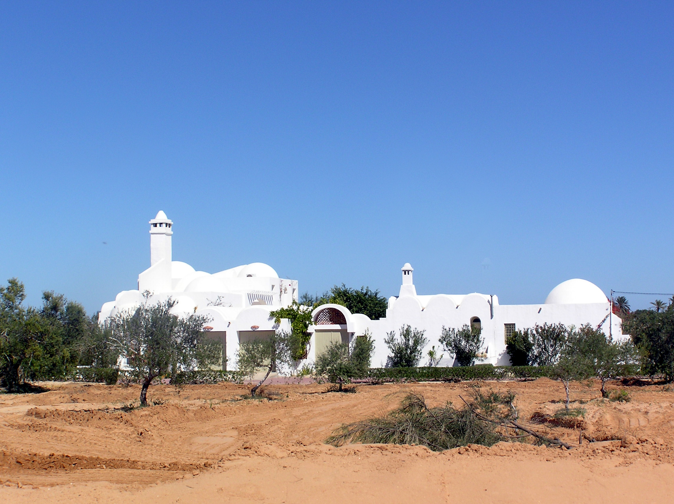 on an inland bike trip